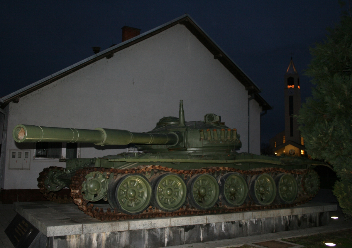 "Groblje tenkova" na Trpinjskoj cesti